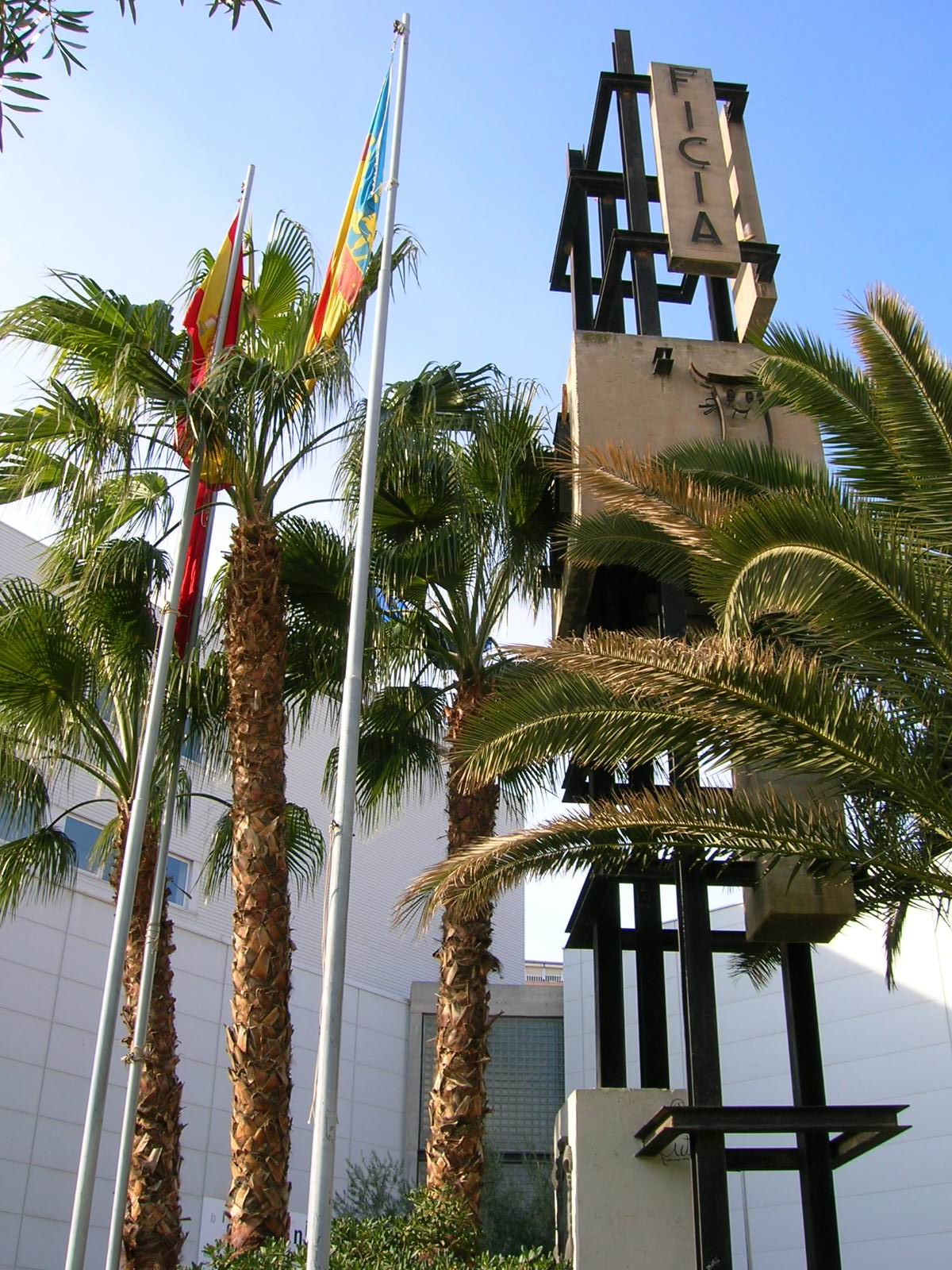 Monumento entrada de la FICIA